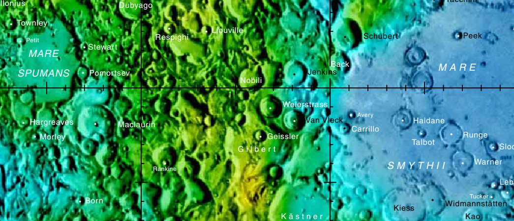 Cráter lunar Van Vleck. Localización (Imagen cartográfica LRO)